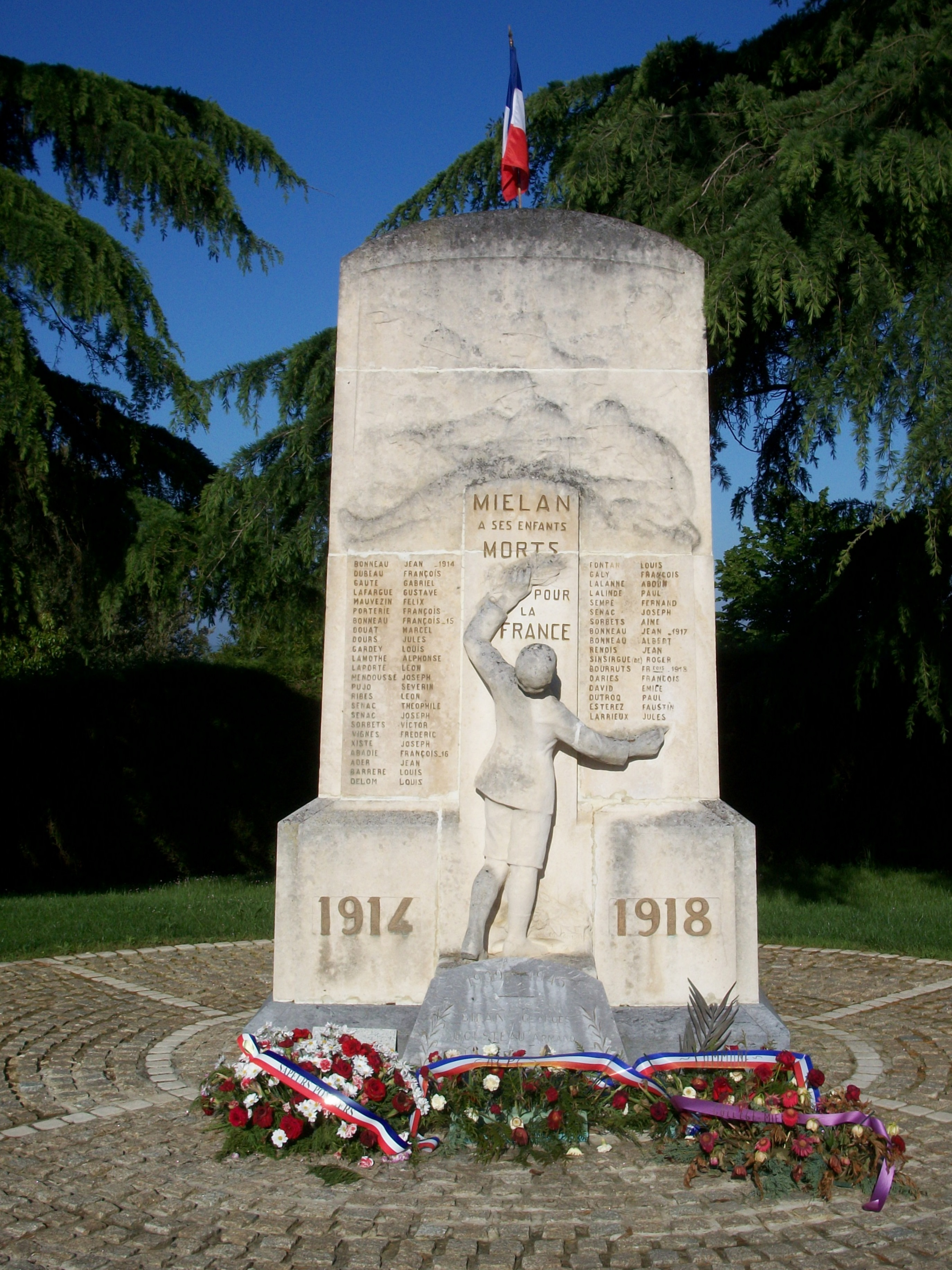 Monument aux morts de Miélan (Gers, France).